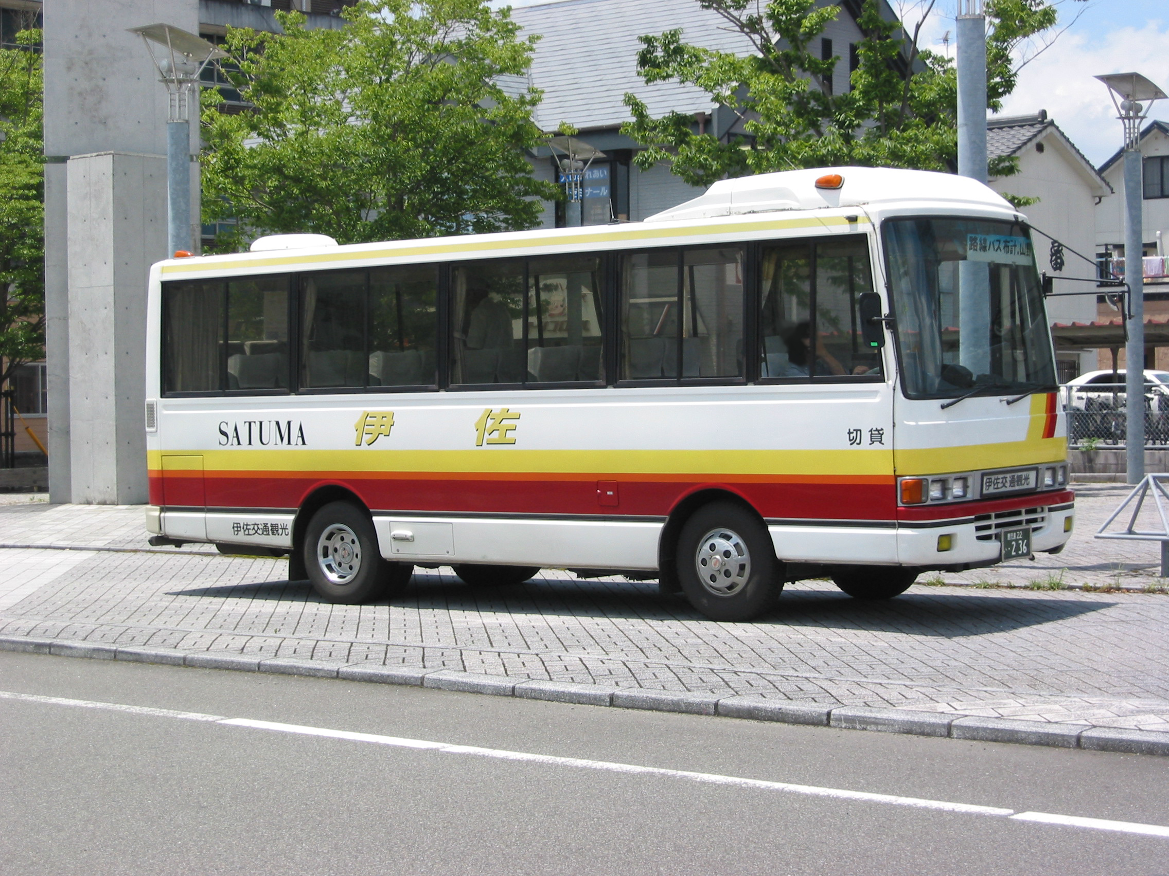 伊佐交通観光 路線バスの車両